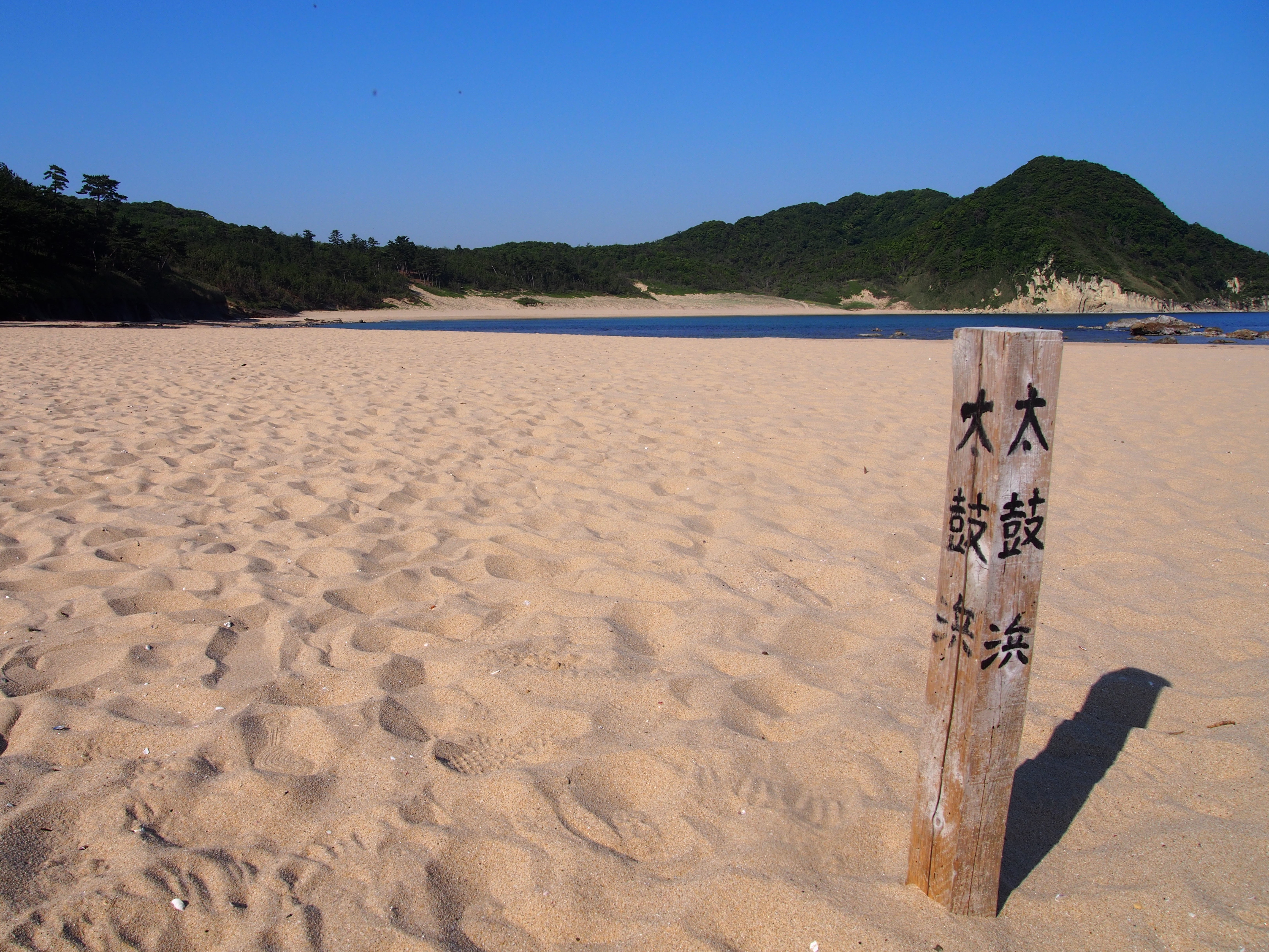 琴引浜の中央部。太鼓浜と呼ばれる場所。